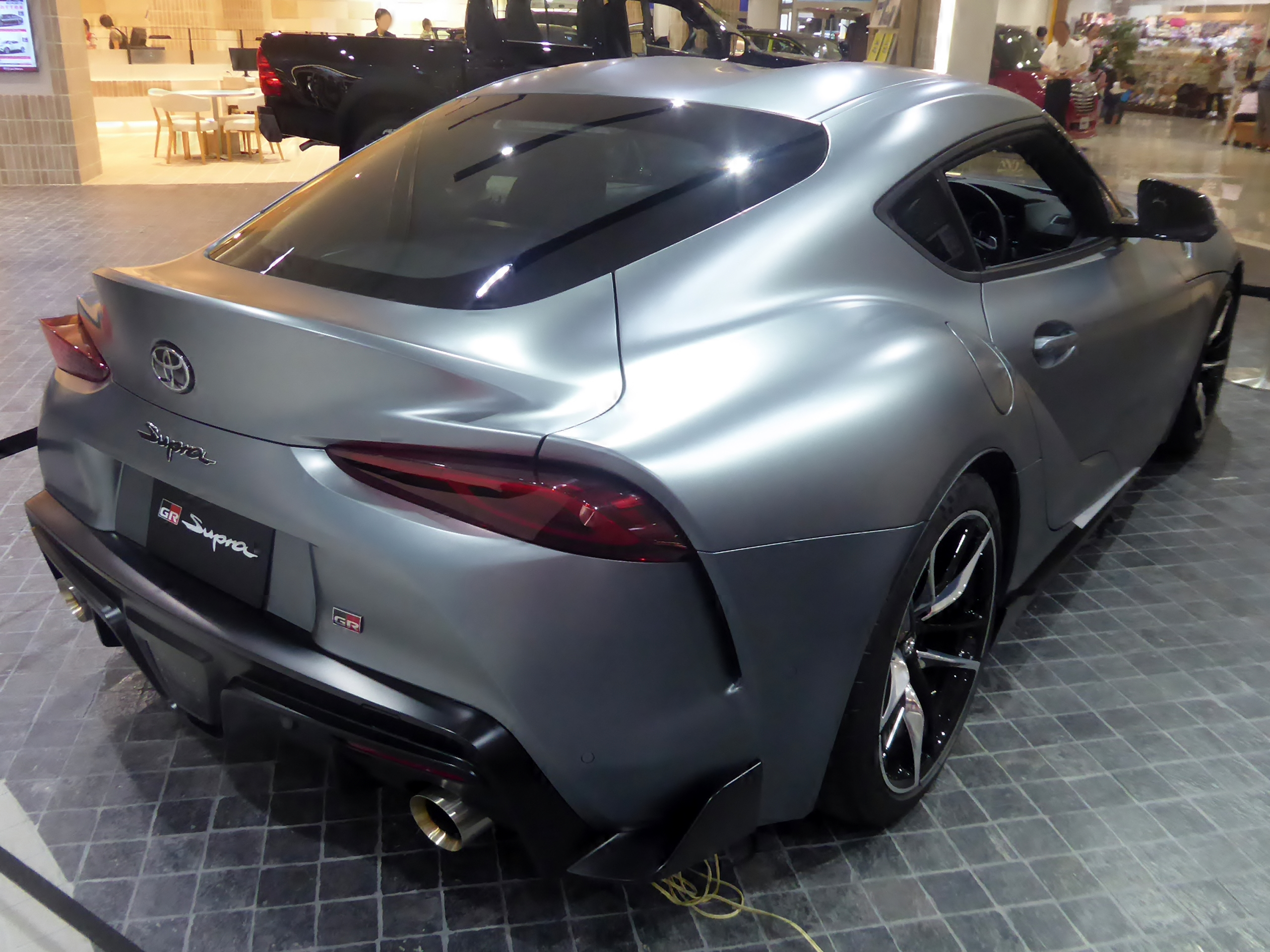 3BA-DB42-ZRRW型トヨタ・GRスープラRZをリアから撮影。